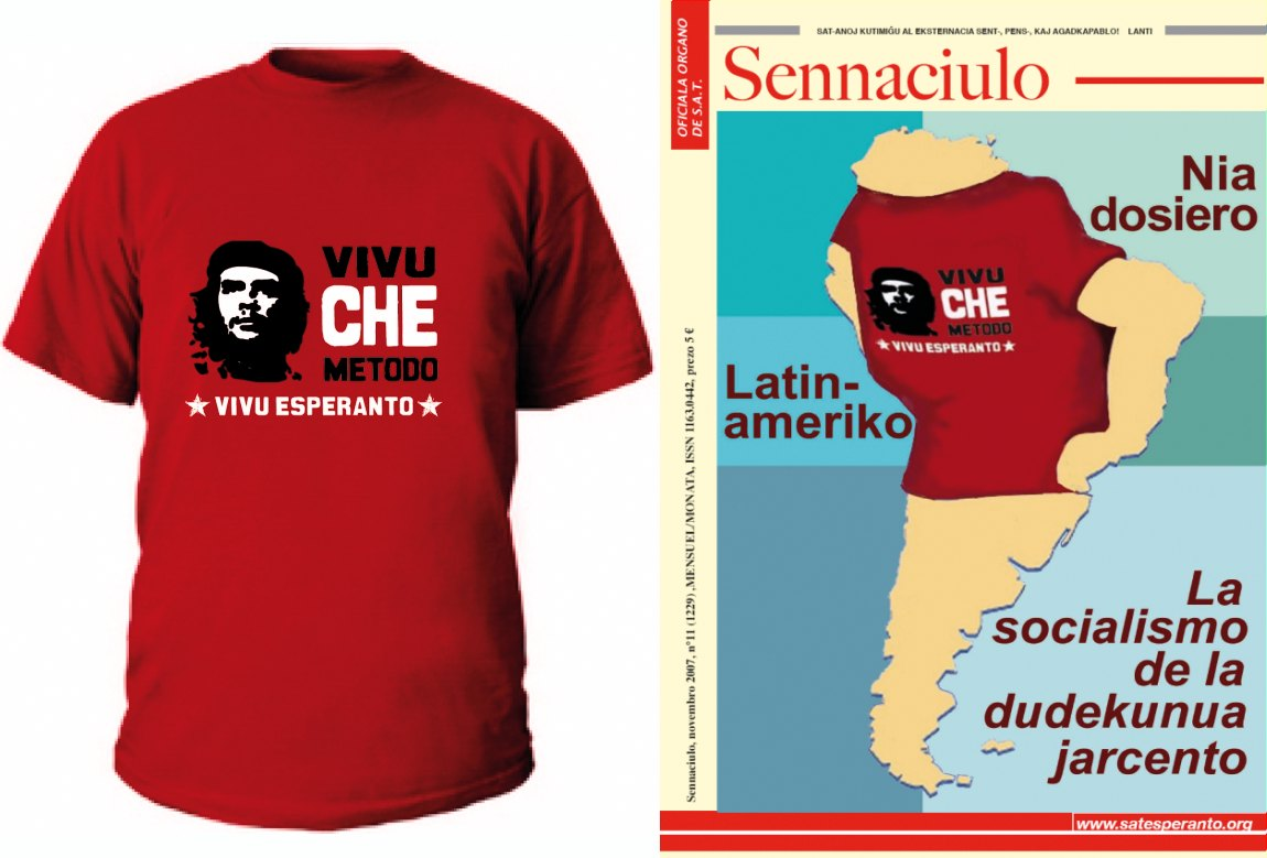 Kovrilpaĝo de S-ulo pri T-CHE-mizo...